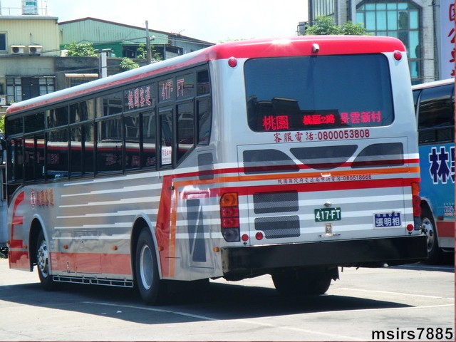 桃園客運2011年固亞車體大客車417-FT。